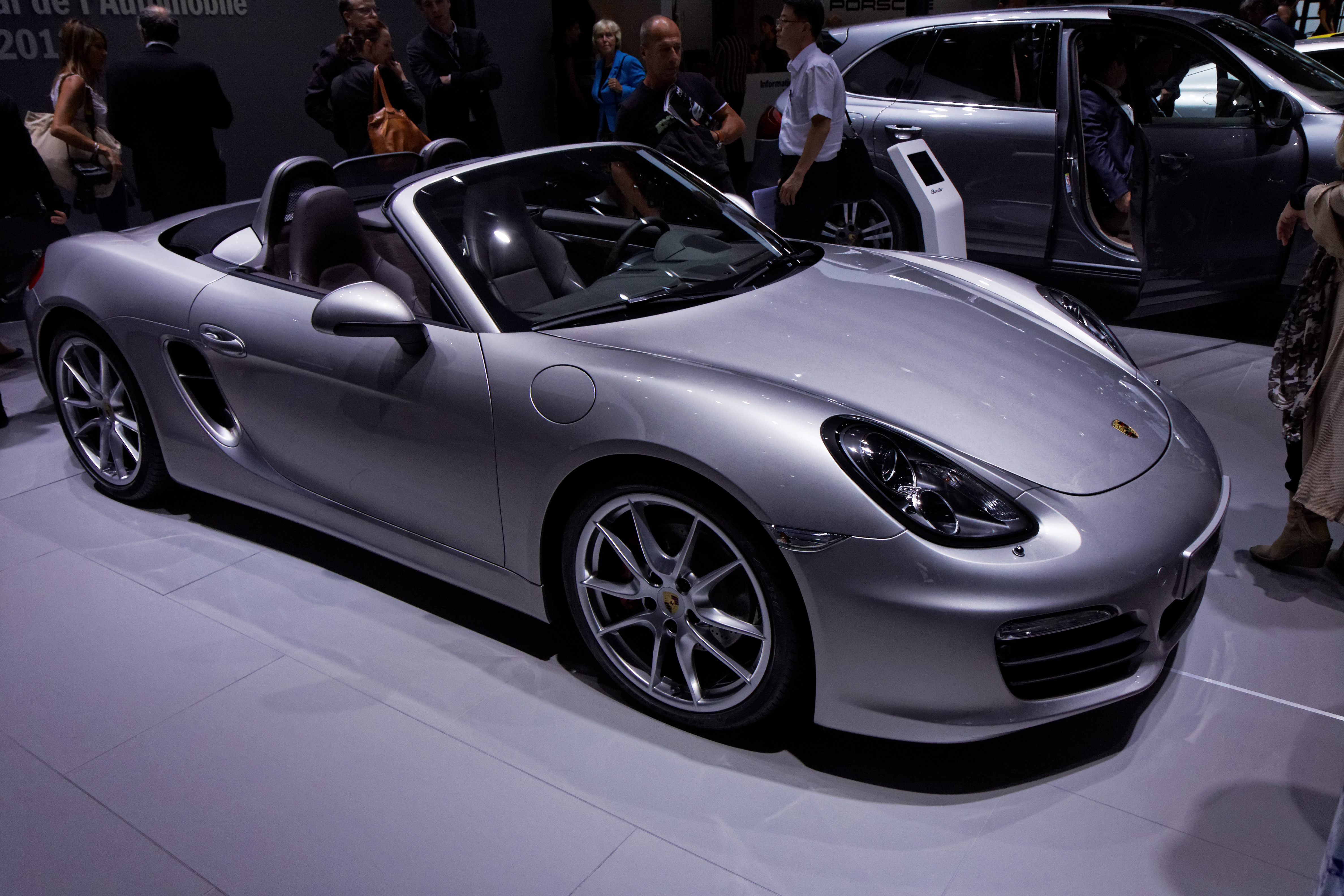 une Porsche Boxster présentée lors du Mondial de l'automobile de Paris 2012.